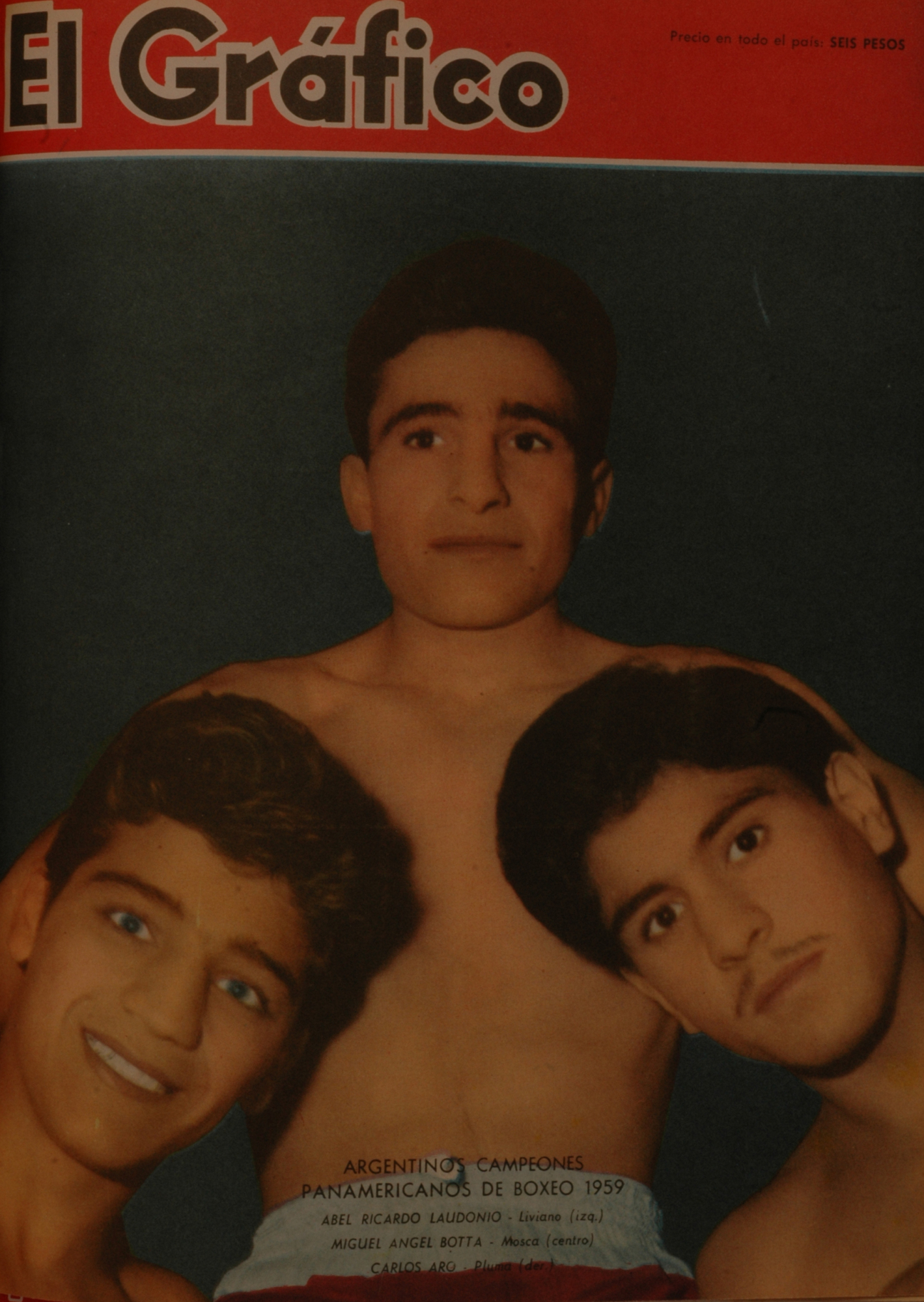 El Grafico del 14 de Octubre de 1959. Edicion 2090